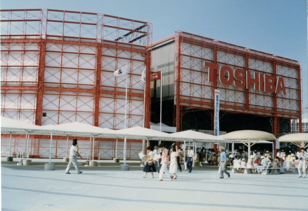 科学万博